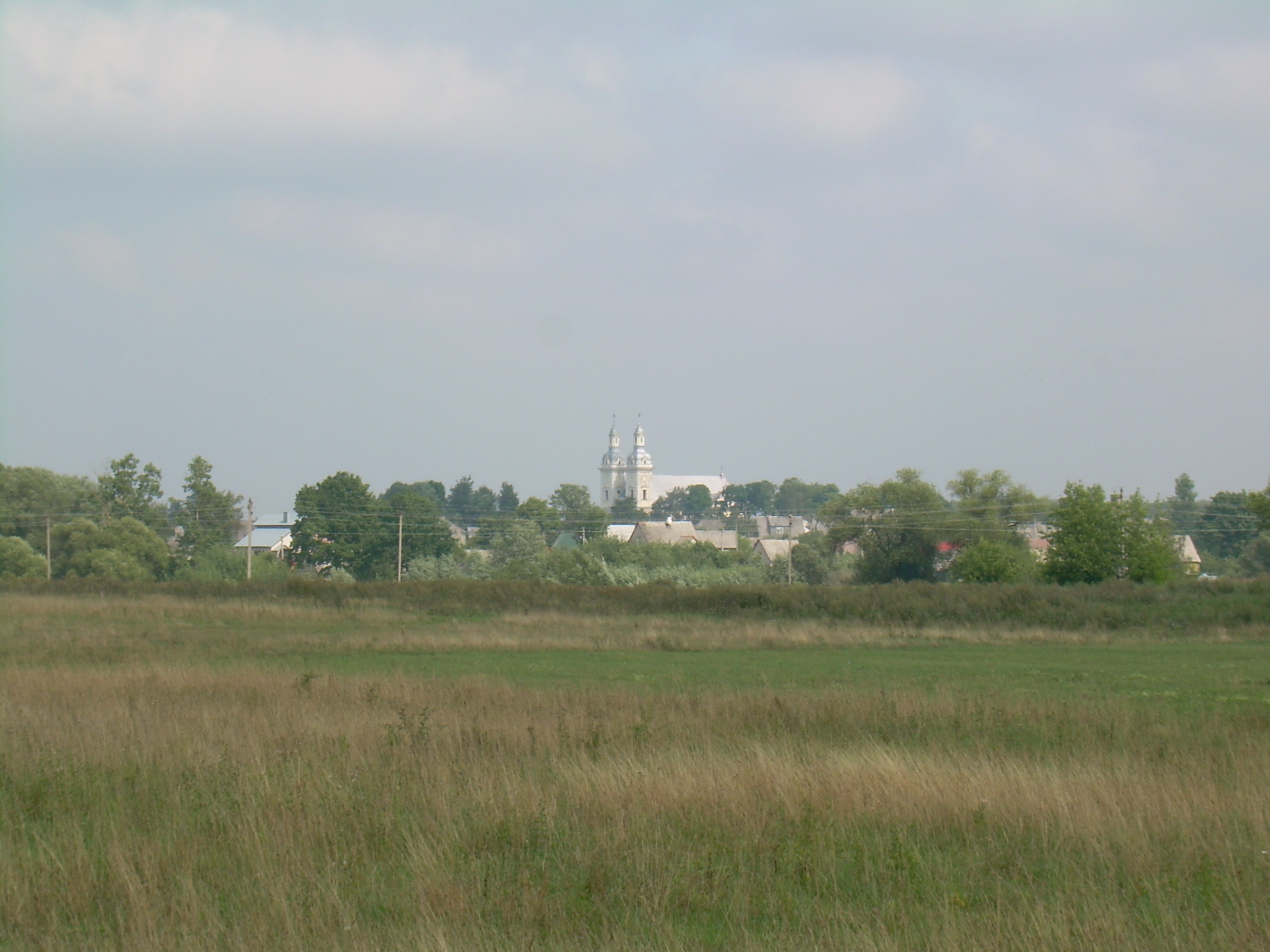 Šeduvos Šv. Kryžiaus Atradimo bažnyčia